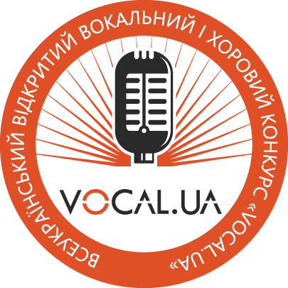 Логотип Всеукраїнського відкритого вокального і хорового конкурсу «VOCAL.UA»